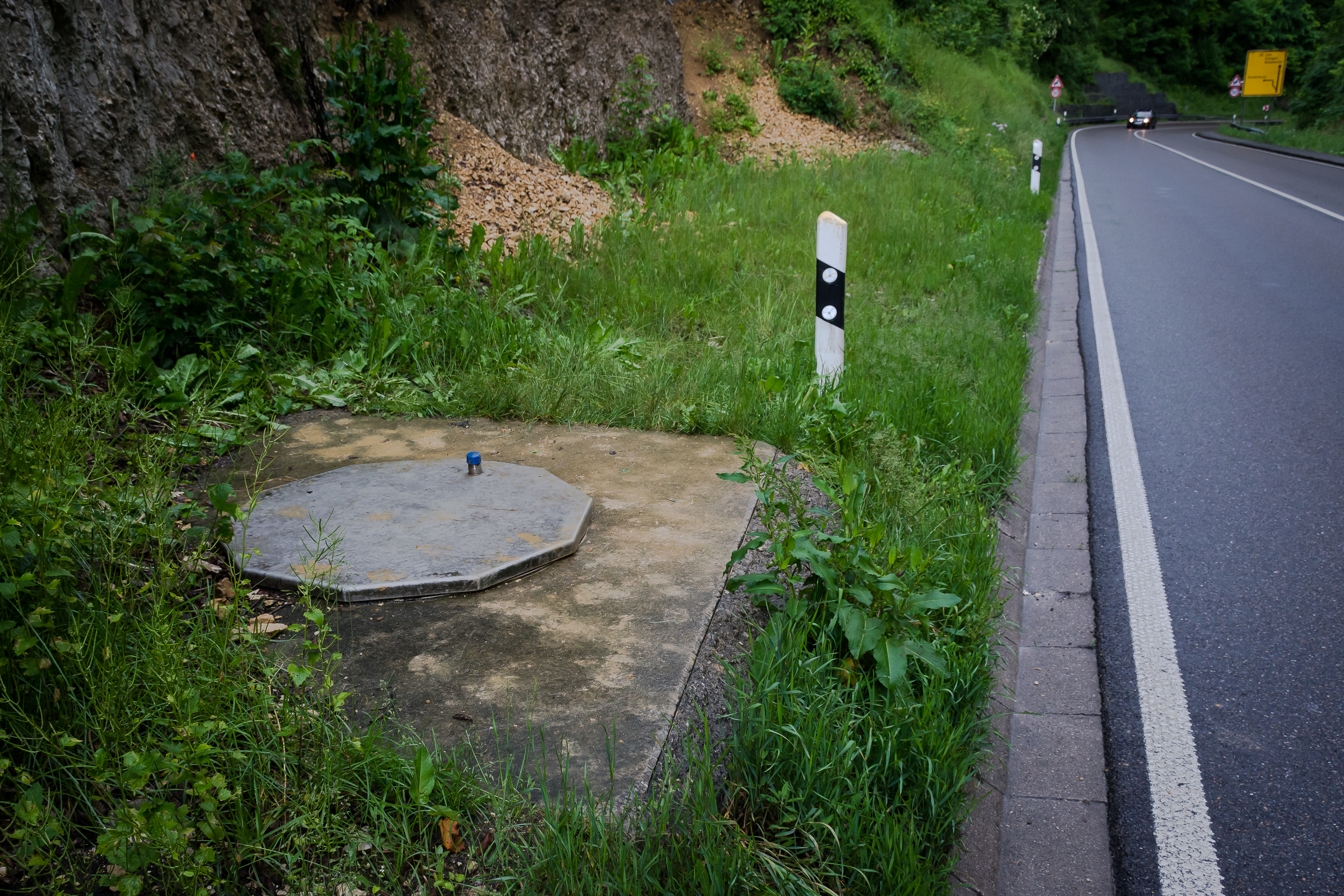 Der mit einem Deckel verschlossene Zugangsschacht zur Blautopfhöhle neben der B 28.